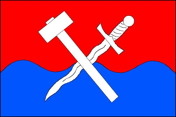 Vlajka obce Česká Ves